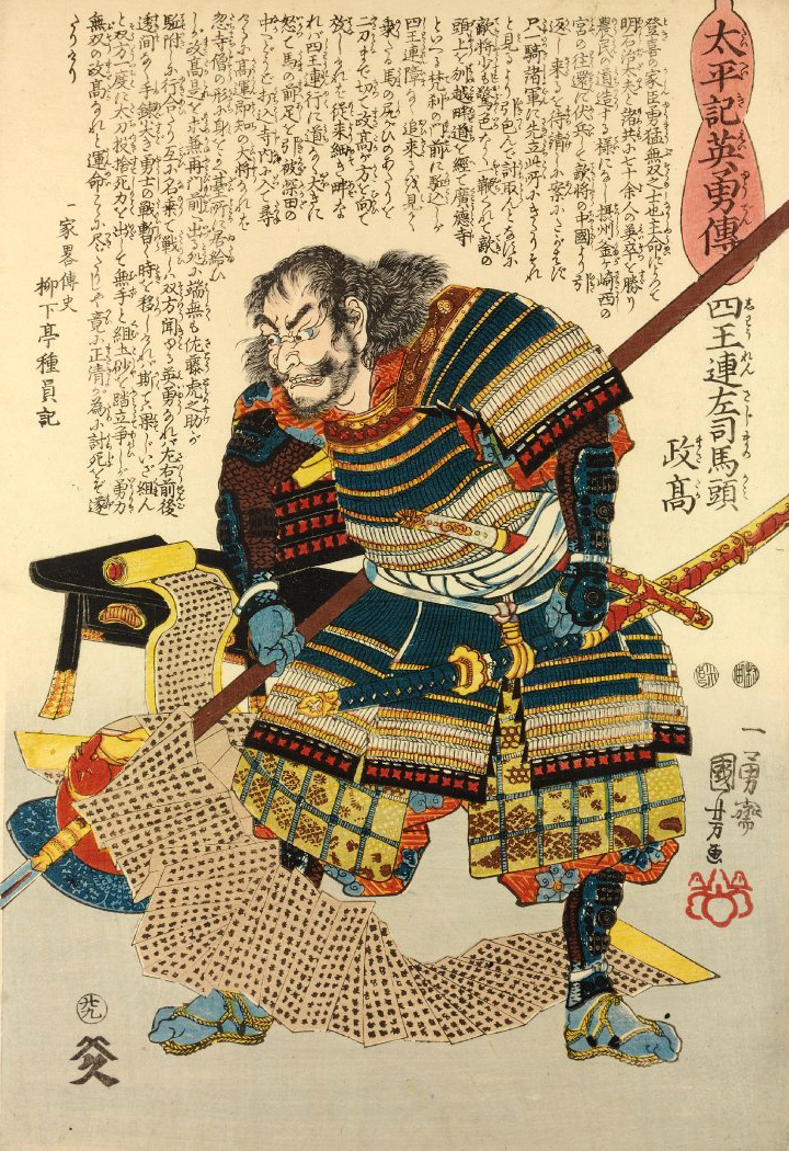 「太平記英勇傳二十九：四王連左可馬頭政高（四王天政孝）」